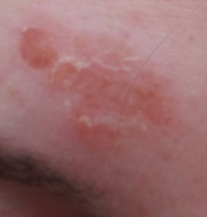 Hudinfektion i pannan orsakad av stafylokocker